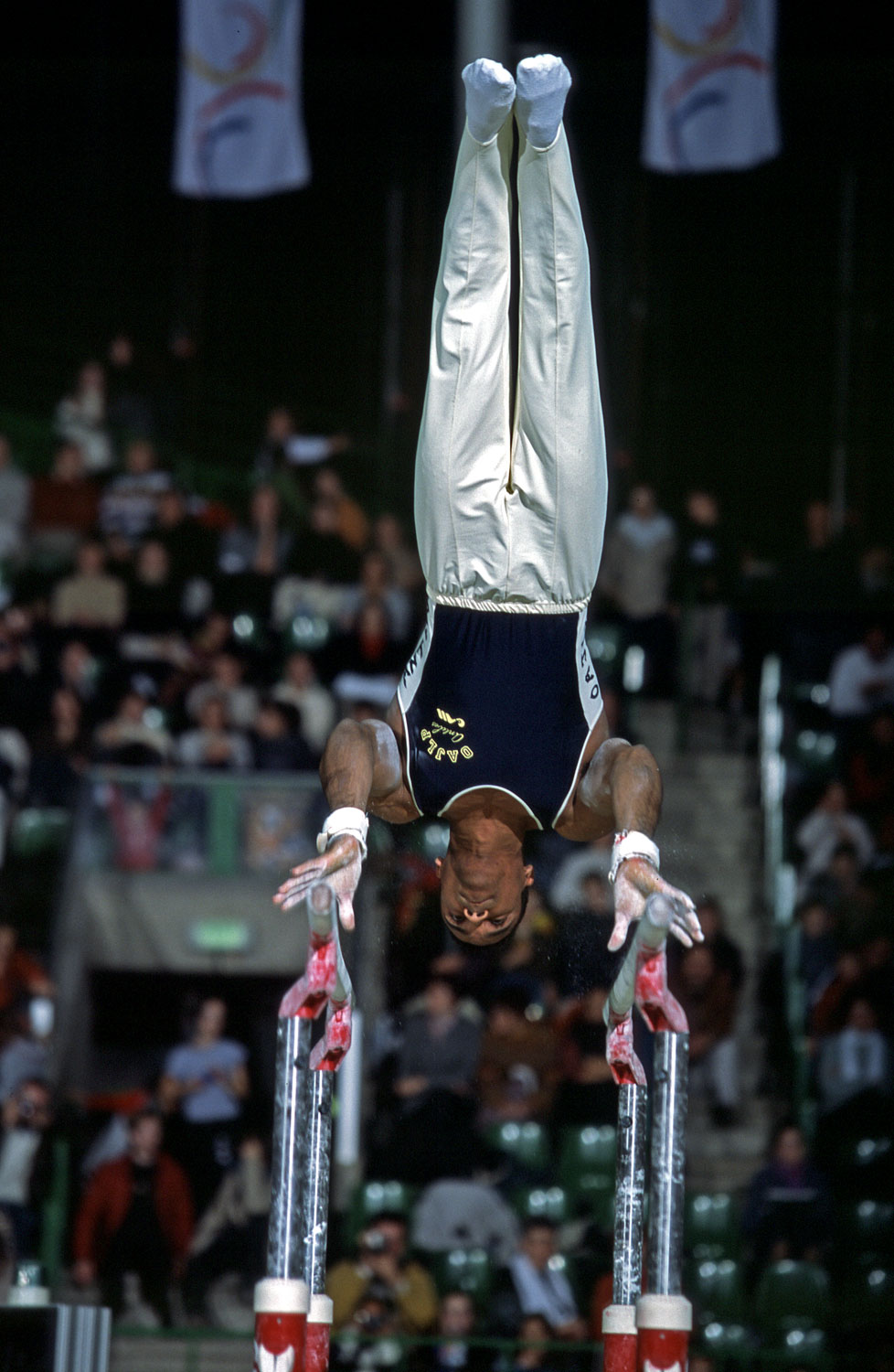 Eric CASIMIR Chpt. d'Europe des Clubs NANTES 08-09/12/2001